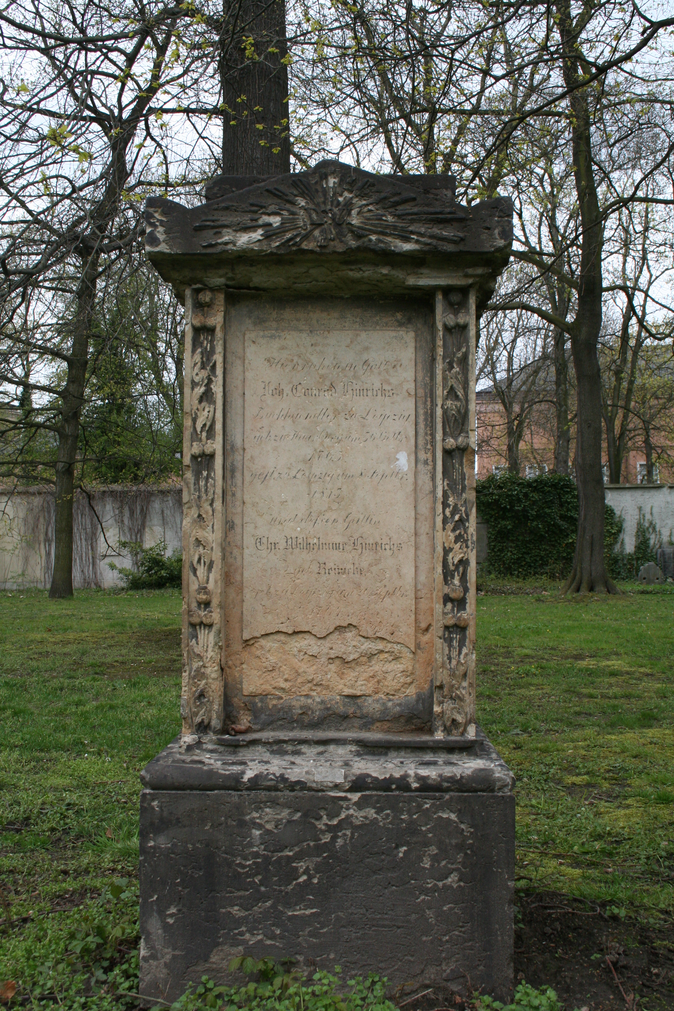 Grabstein des Verlegers und Buchhändlers Johann Conrad Hinrichs auf dem Alten Johannisfriedhof in Leipzig